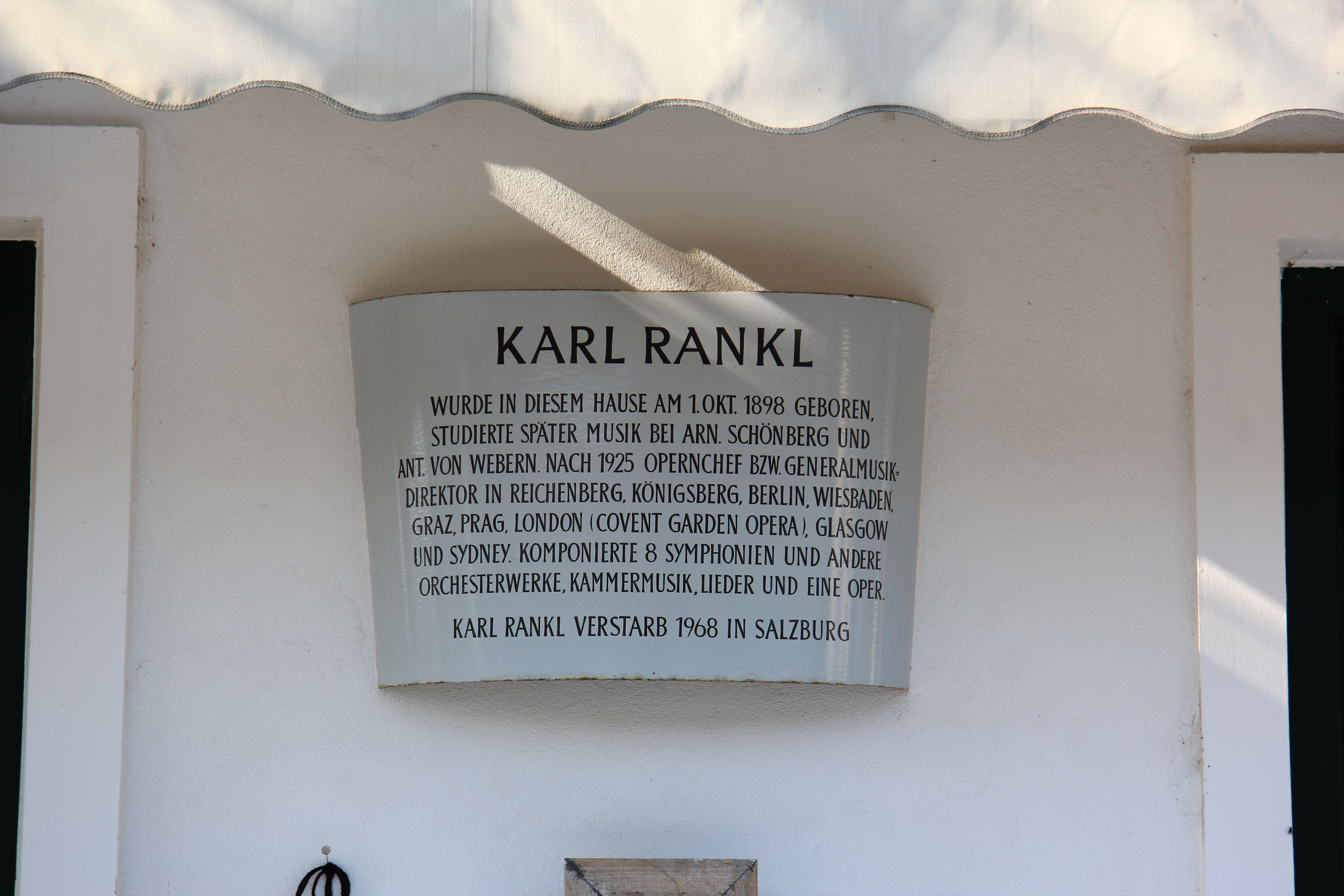 Tafel am Geburtshaus vom Komponisten Karl Rankl in Gaaden, Niederösterreich